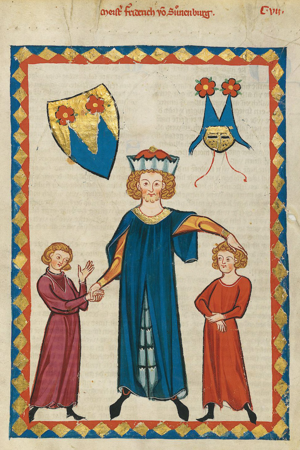 Codex Manesse, UB Heidelberg, Cod. Pal. germ. 848, fol. 407r, Friedrich von Sonnenburg